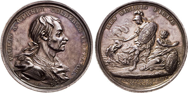 preußische Gedenkmünze von 1760, zur erfolgreichen Verteidigung von Kolberg, Vorderseite General von Werner, Rückseite alegorische Scene